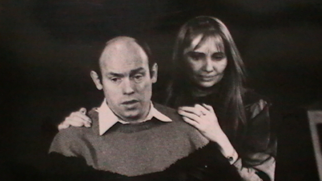 Сцена из спектакля «Дракон» Ленинградского государственного театра им. Ленинского комсомола. В роли Кота Виктор Сухоруков, в роли Эльзы Лариса Луппиан.